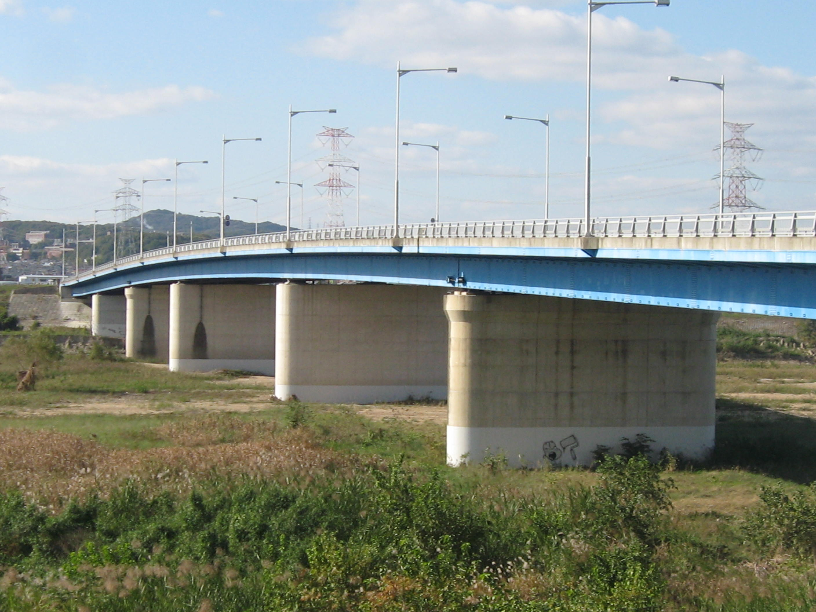 2011年11月16日にcrown userが撮影した玉水橋の画像